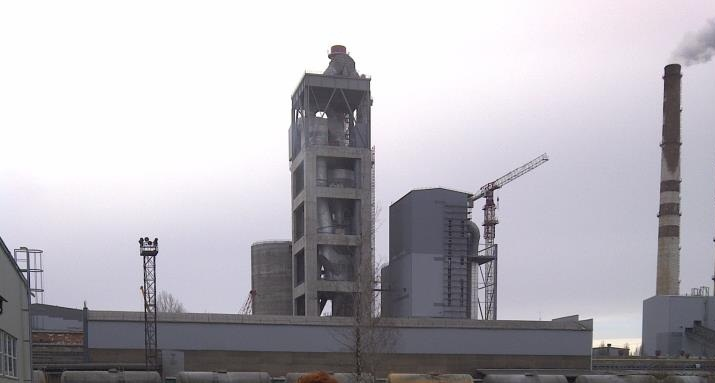 Vienintelė Baltijos šalyse pluoštinio cemento banguotų lakštų stogams gamyklą. Į ją investuota 70 mln. Lt. Dirba apie 110 darbuotojų.